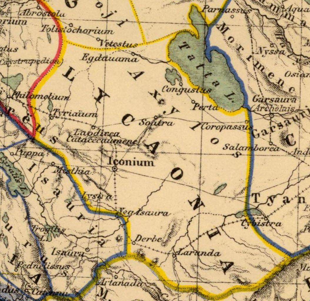 Lycaonia. Asia citerior. Auctore Henrico Kiepert Berolinensi. Geographische Verlagshandlung Dietrich Reimer (Ernst Vohsen) Berlin, Wilhemlstr. 29. (1903)